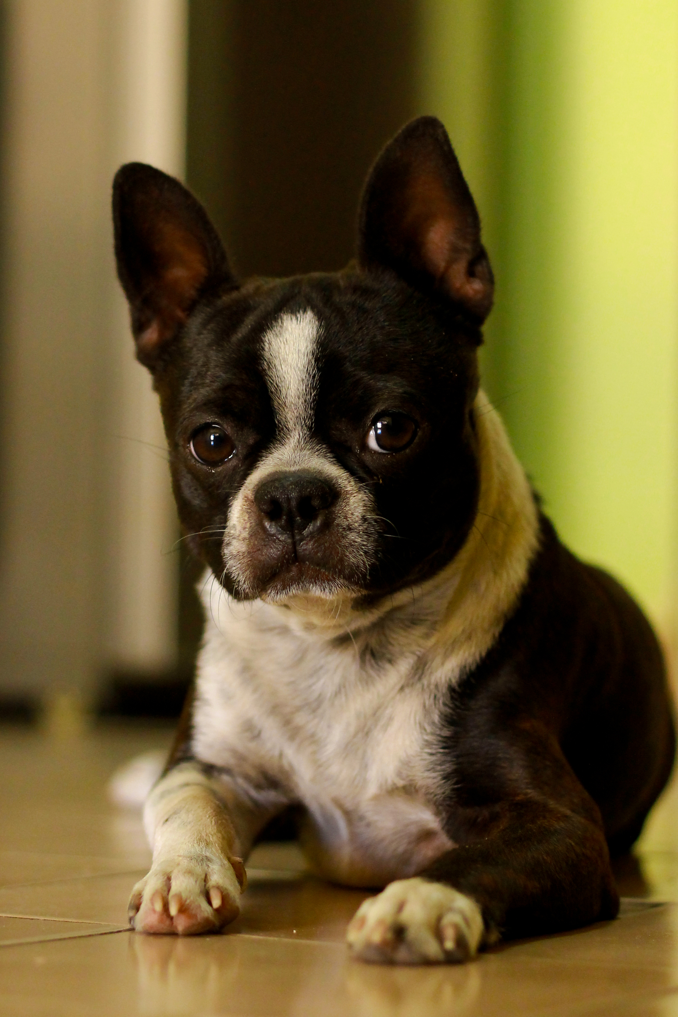 Boston Terrier